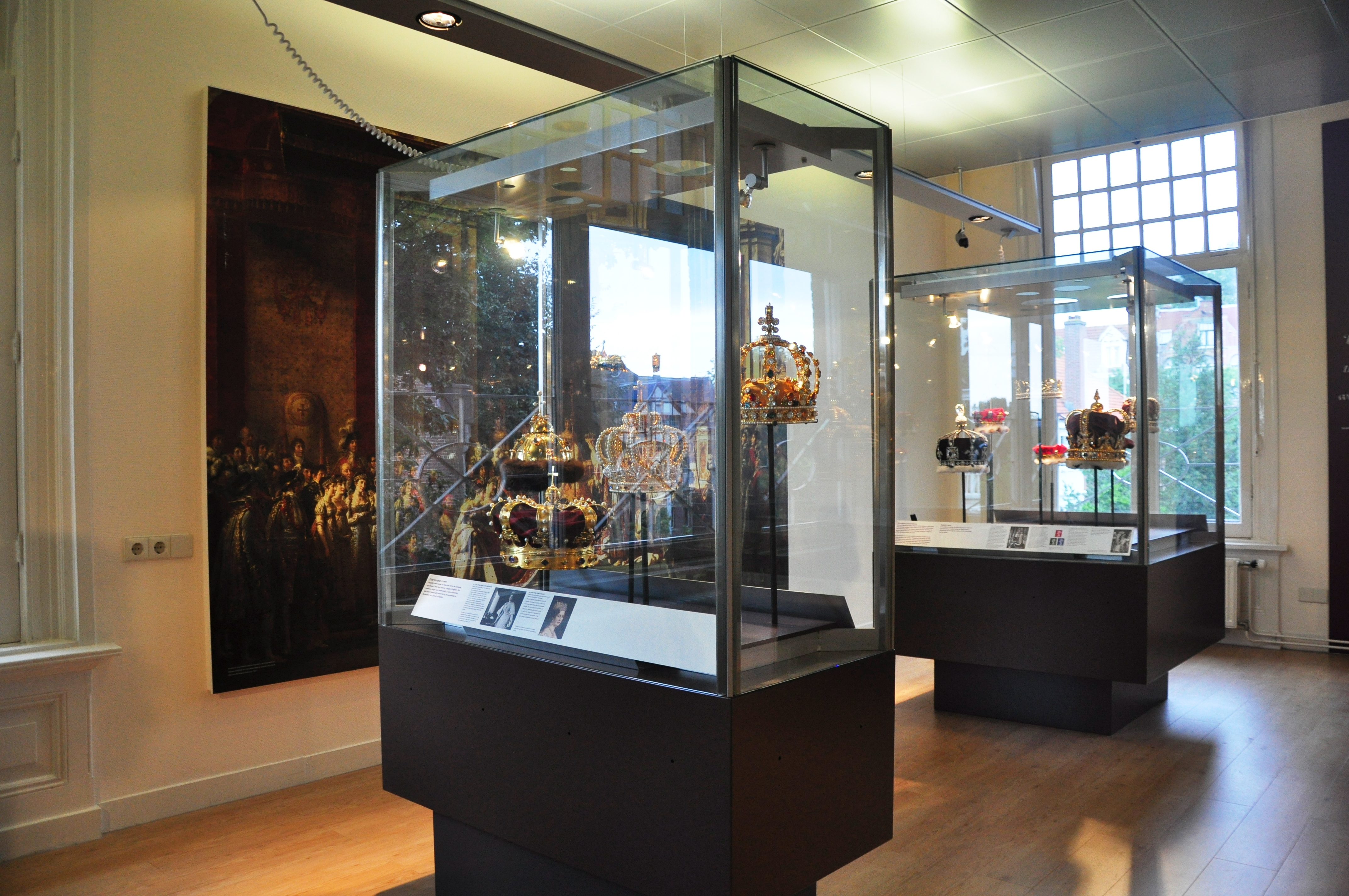 Holland, Amsterdam, Diamant-Museum